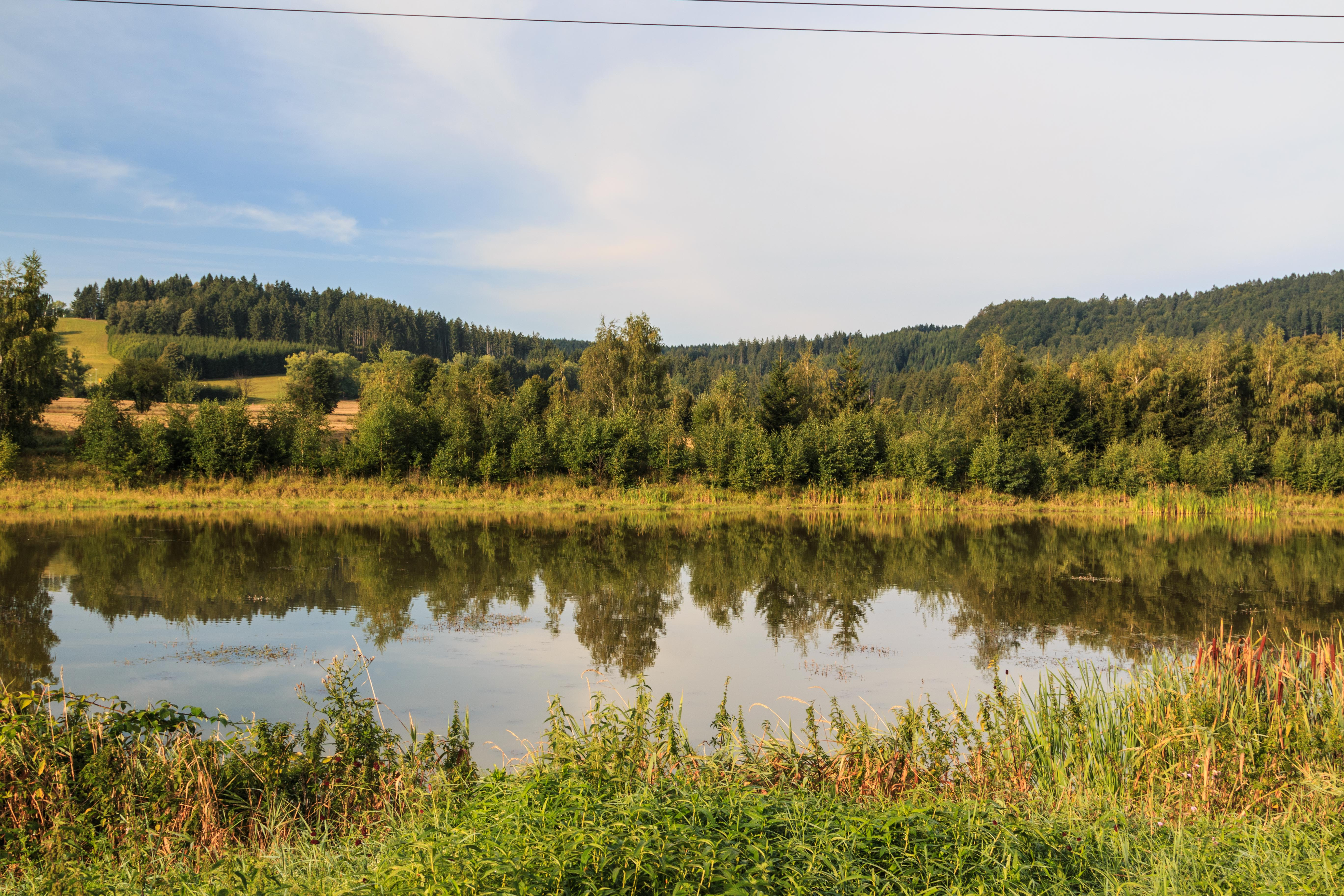 Trucovný rybník u Přívratu